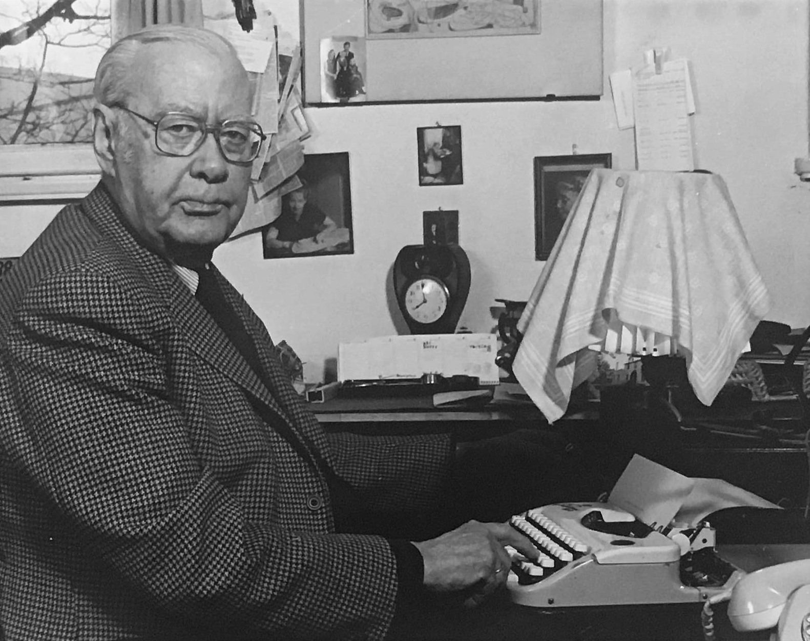 Friedrich Luft mit seiner Schreibmaschine auf dem Schoß in seiner Wohnung am Nollendorfplatz in Berlin.